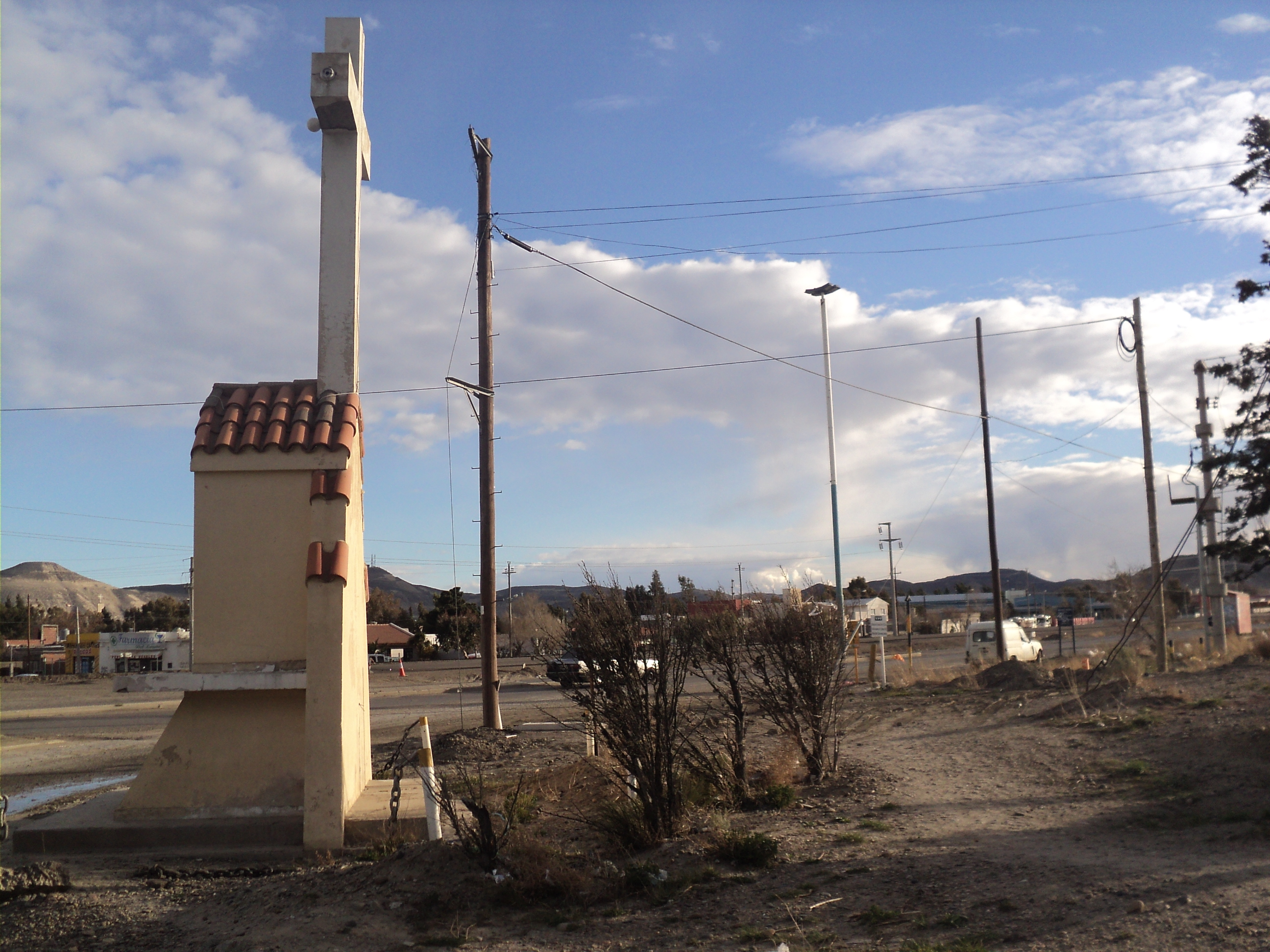 Vista de la zona donde se asentó la parada Gasoducto